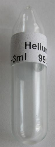 Bildbeschreibung: 3 ml Helium in einer Glasampulle Quelle: eigenes Foto Fotograf: Tomihahndorf Datum: März 2006